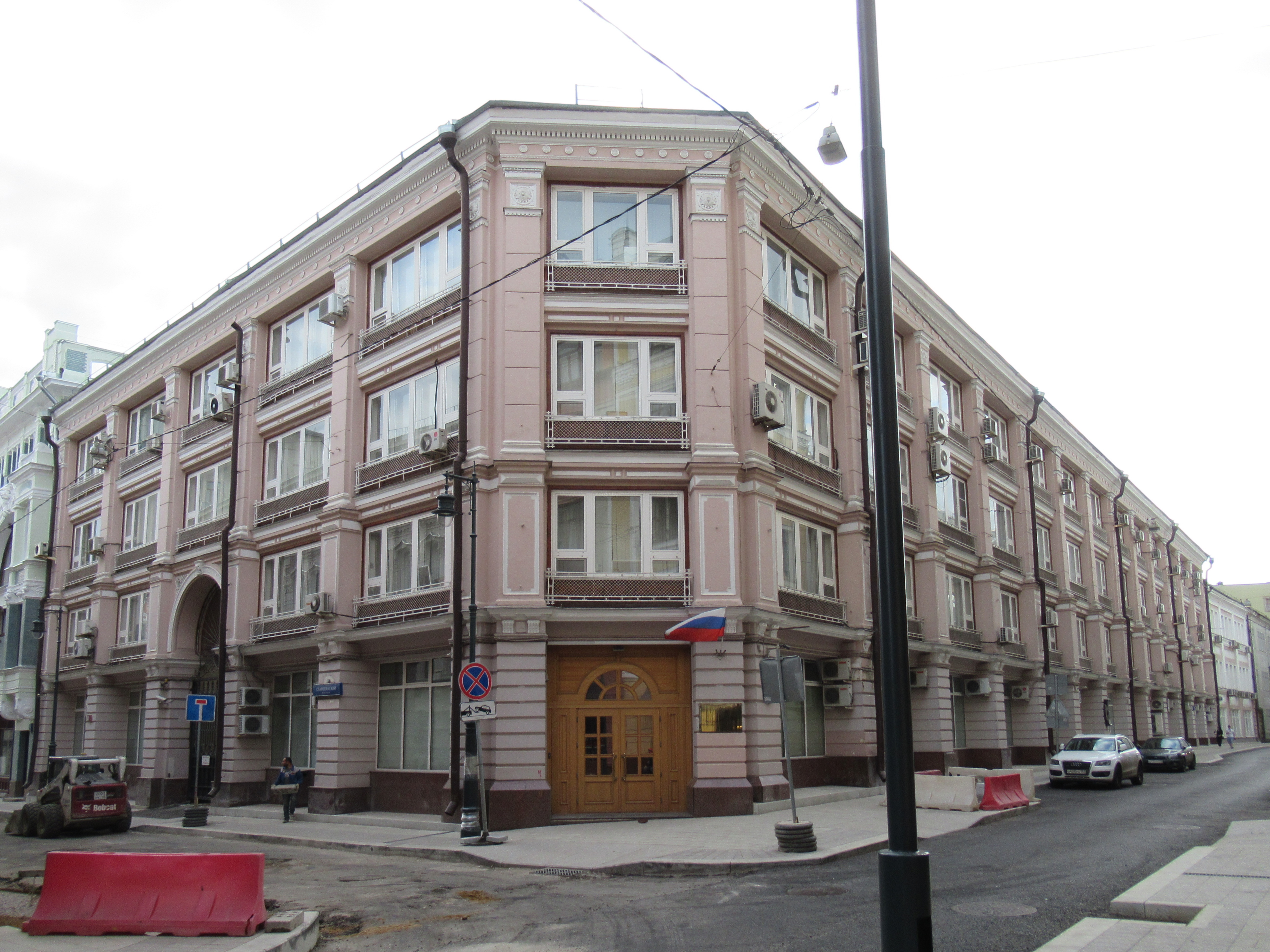 Торговый дом: Черкасский Б. пер., дом 6/7, Тверской, Центральный округ, Москва